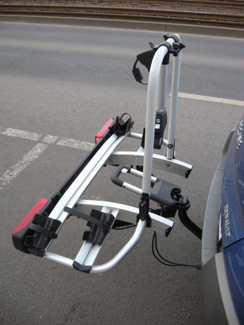 Fahrradträger auf einer Anhängerkupplung; Modell: Atera Strada DL2